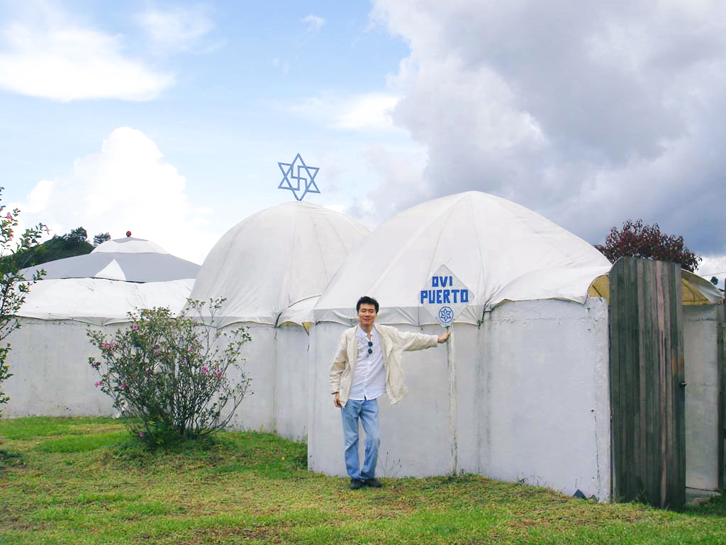 Image Specific